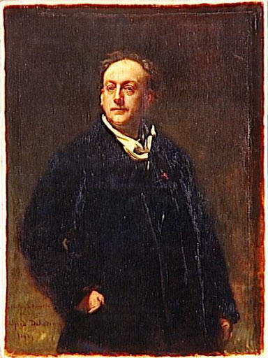 Théodore de Banville